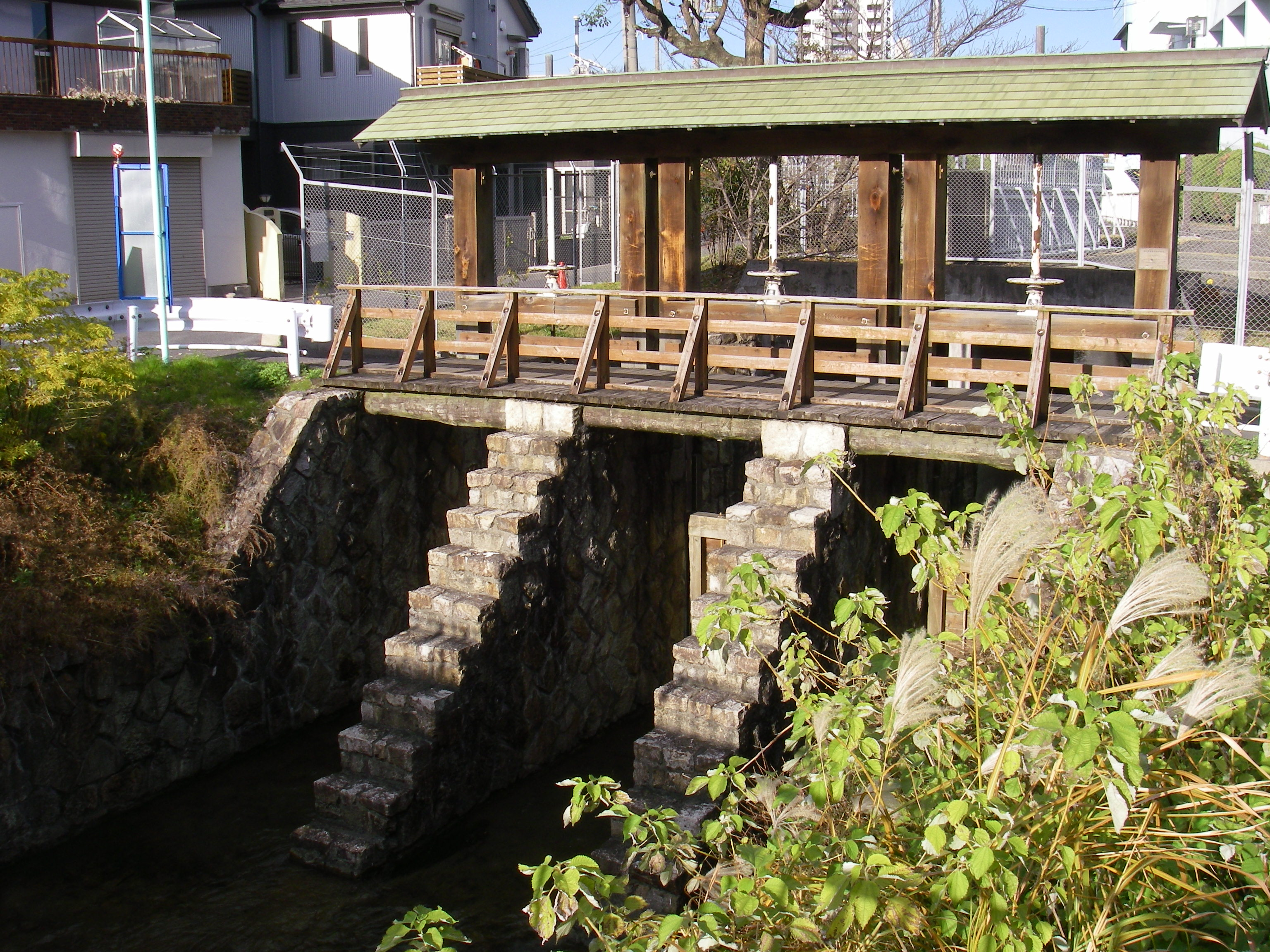 黒川樋門（名古屋市北区）。 名古屋市都市景観重要建築物等に指定されている。